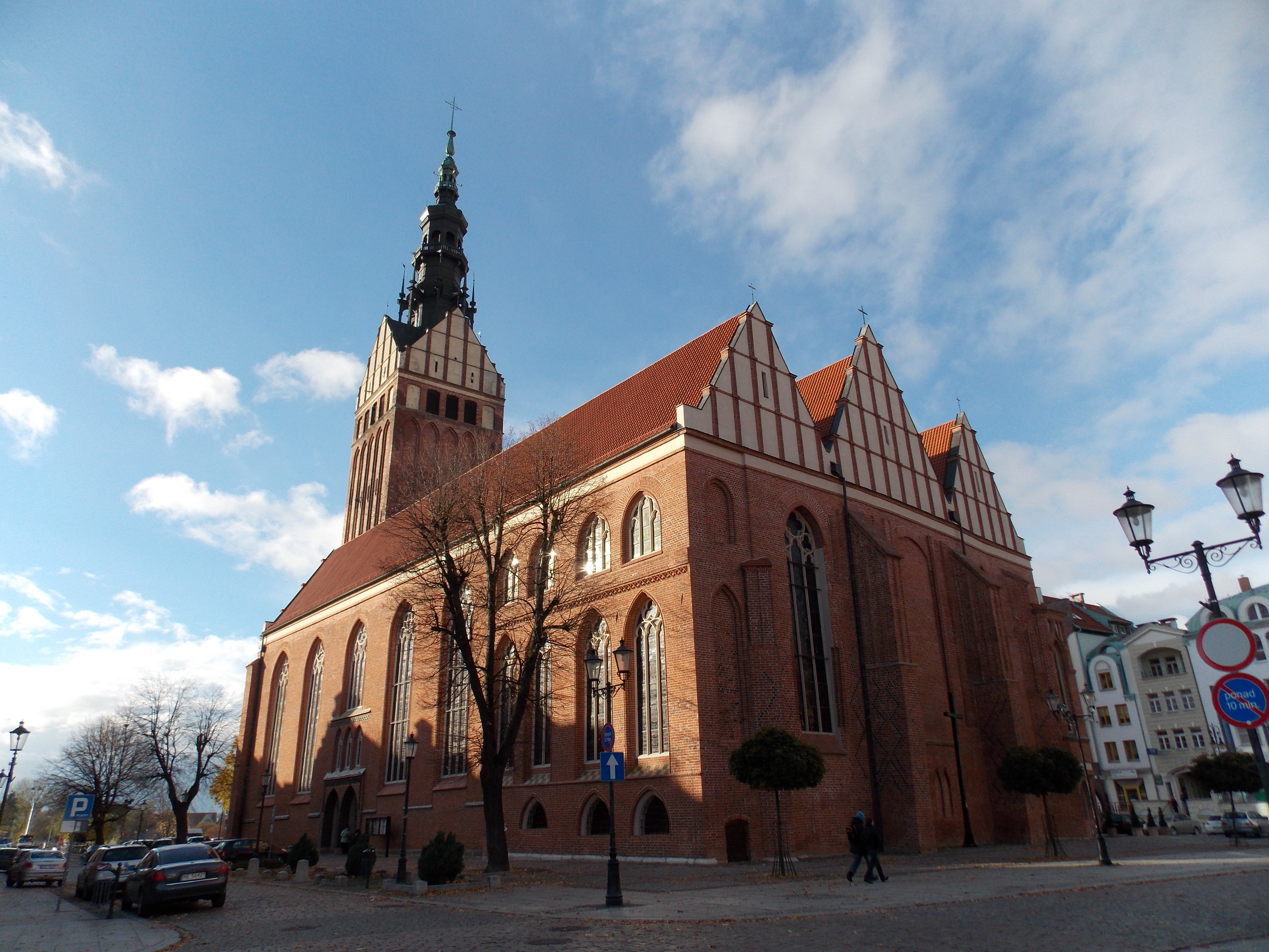 Elbląg, ul. Mostowa 25 - katedra pw. św. Mikołaja